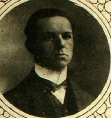 Fotografía del Doctor Luis Calvo Mackenna en una publicación de 1919.